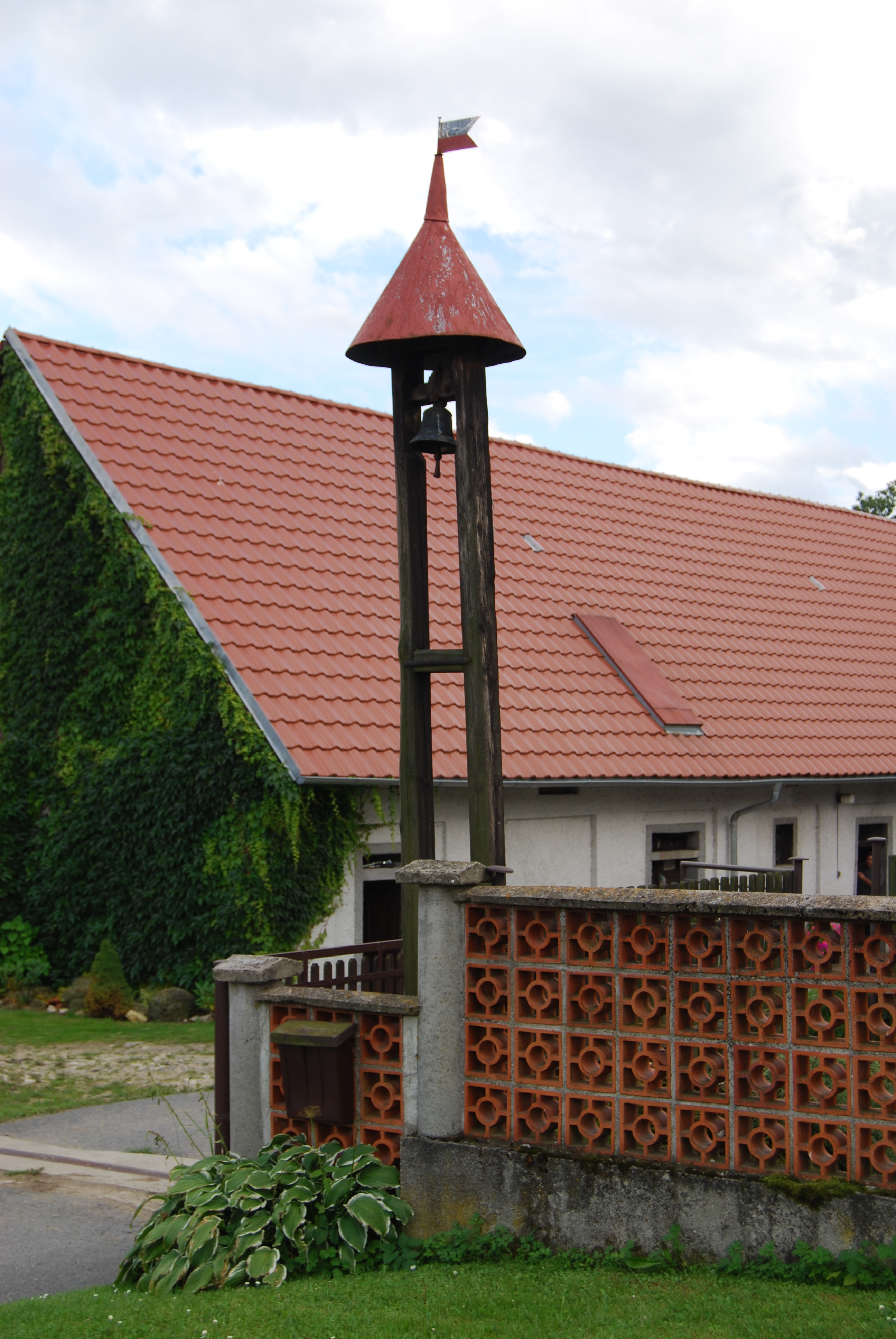 Zvonice v obci. Zbelítov je část obce Jistebnice v okrese Tábor. Česká republika.